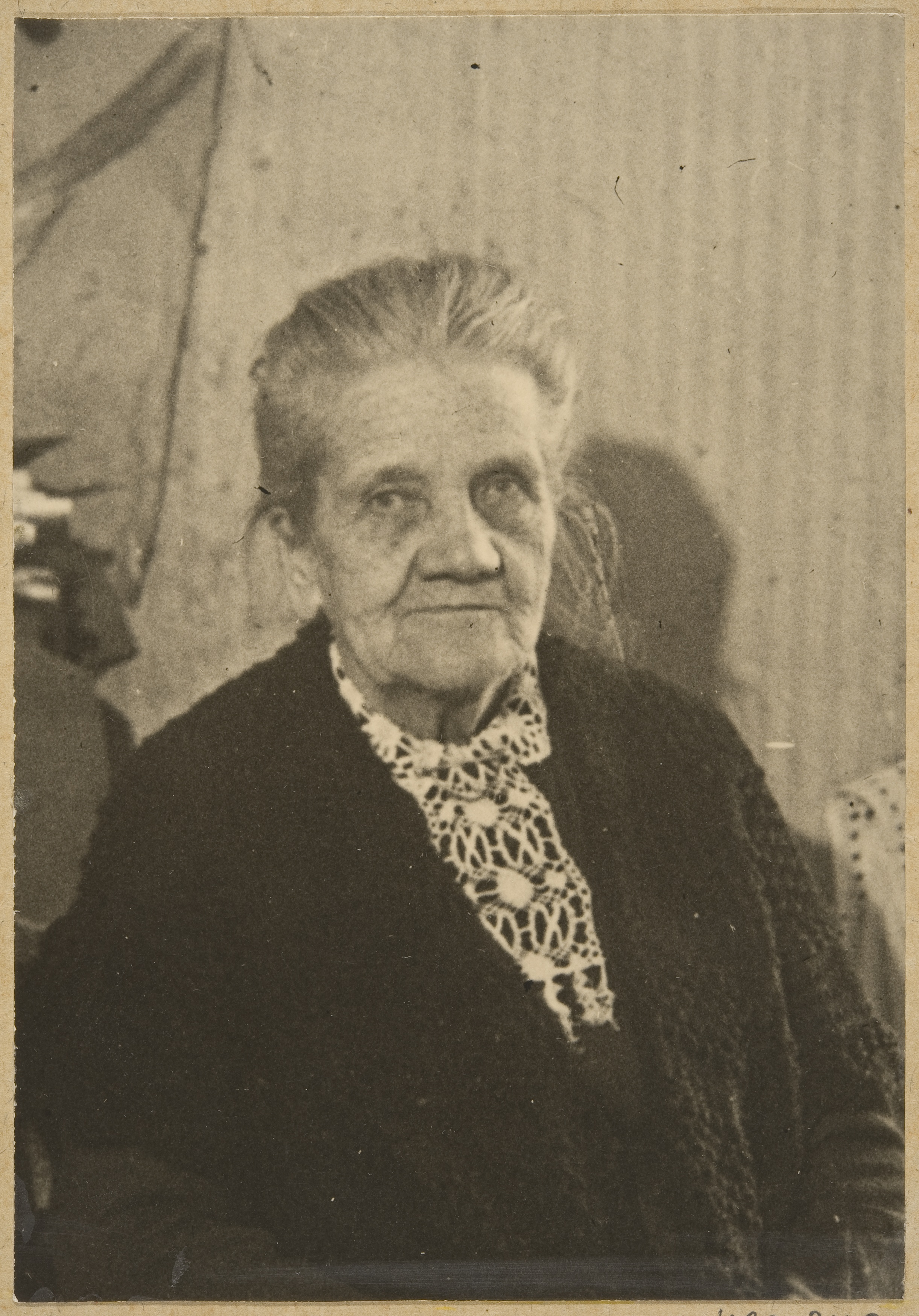 Suomen ensimmäiseksi naispuoliseksi kuvanveistäjäksi mainittu Eveliina Särkelä 85-vuotiaana; pysty, mustavalkoinen